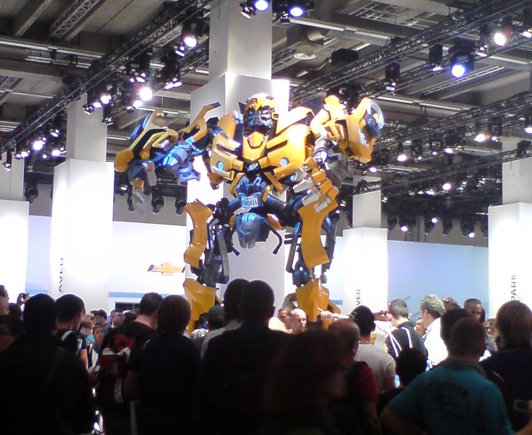 IAA Frankfurt